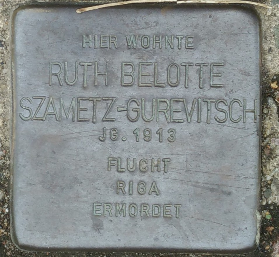 Bad Vilbel, Stolperstein Ruth Belotte Szametz-Gurevitsch